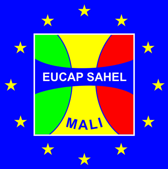 Logo de la mission EUCAP Sahel Mali